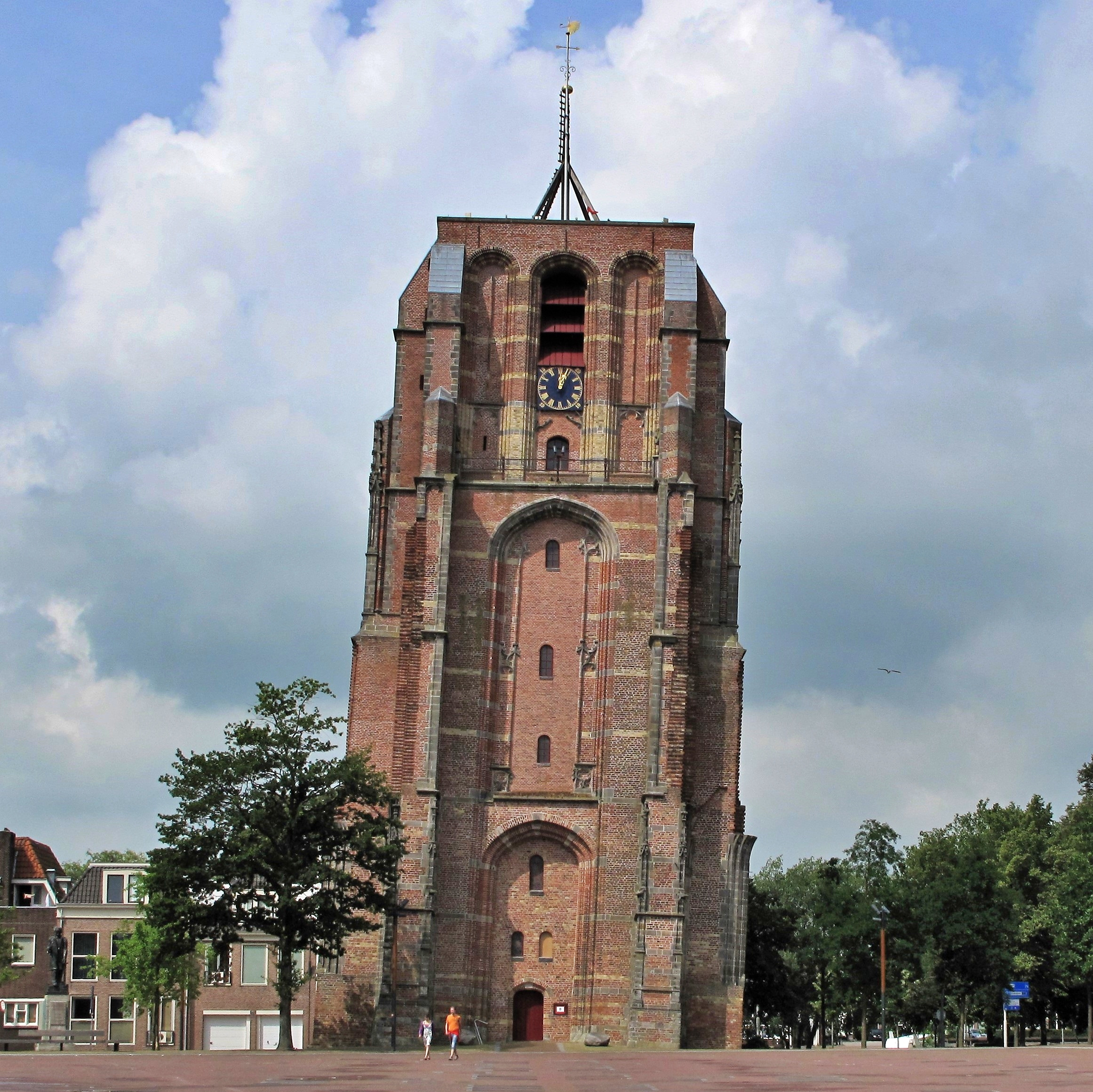 Oldehove, Leeuwarden, Netherlands